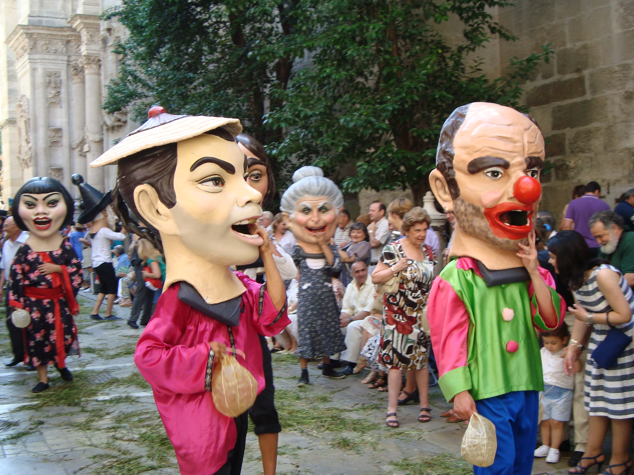 Cabezudos en las calles de la ciudad de Granada, durante el desfile de las fiestas populares del corpus.